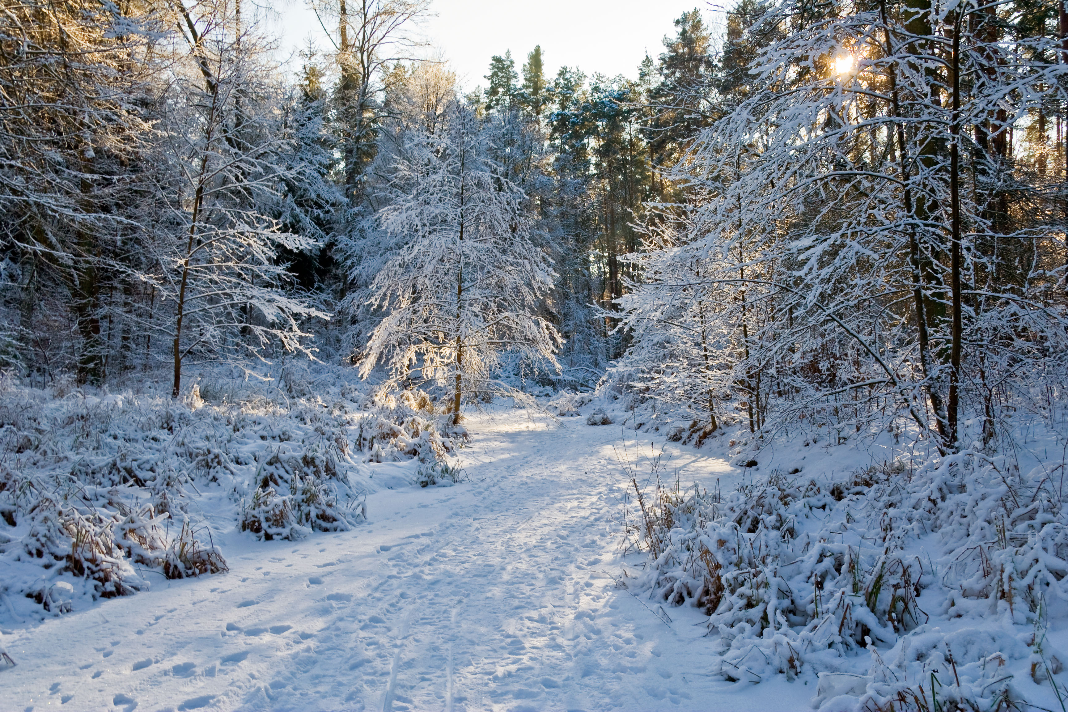 Naturschutzgebiet Krumme Lake, Berlin-Grünau, siehe [1]